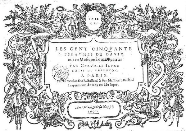 Page de titre Claude Le Jeune - Psaumes à 4 parties (Paris, Ballard, 1601)